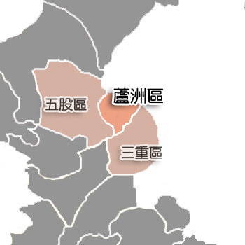 蘆洲區相對位置。